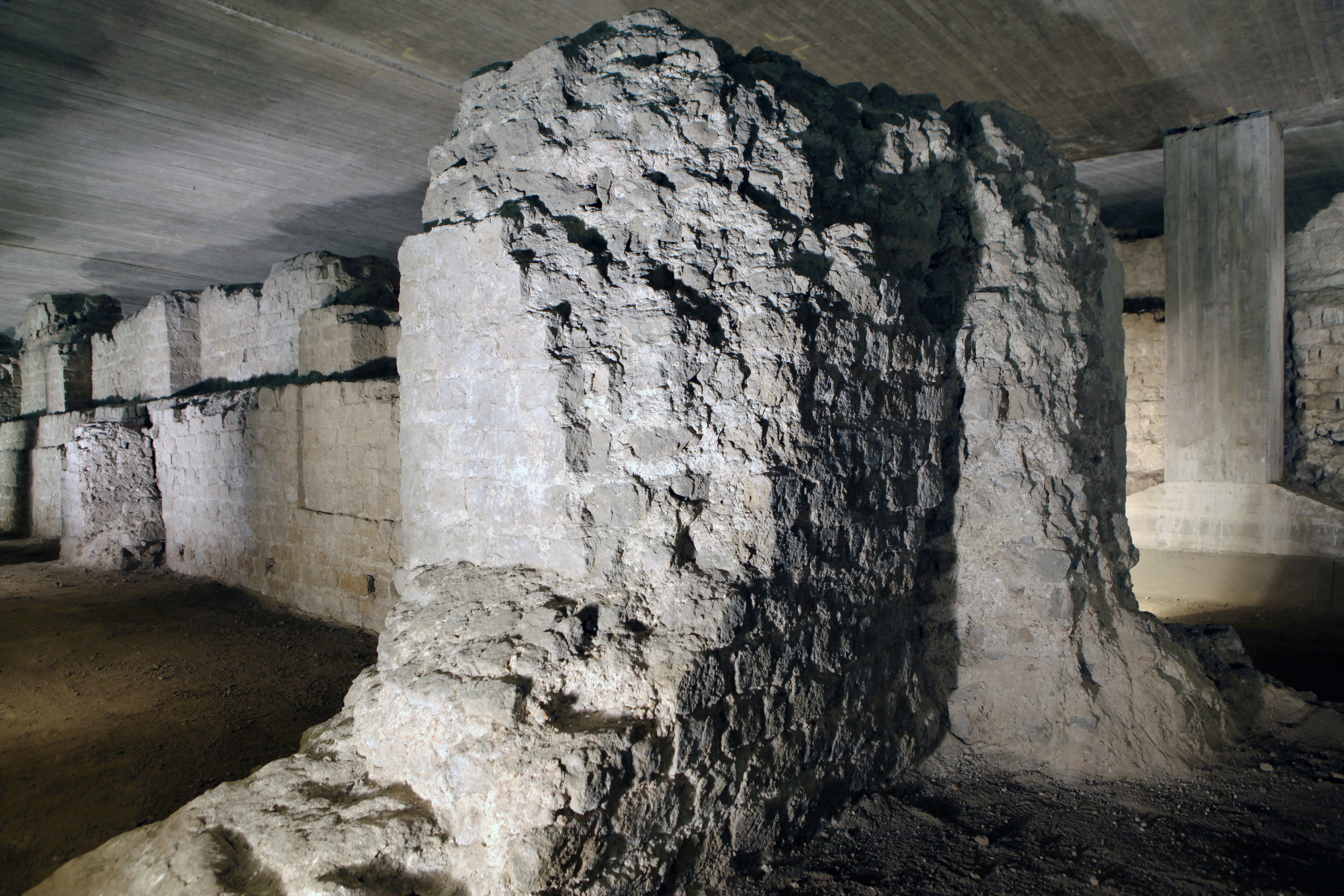 Statthalterpalast Archäologische Zone Köln